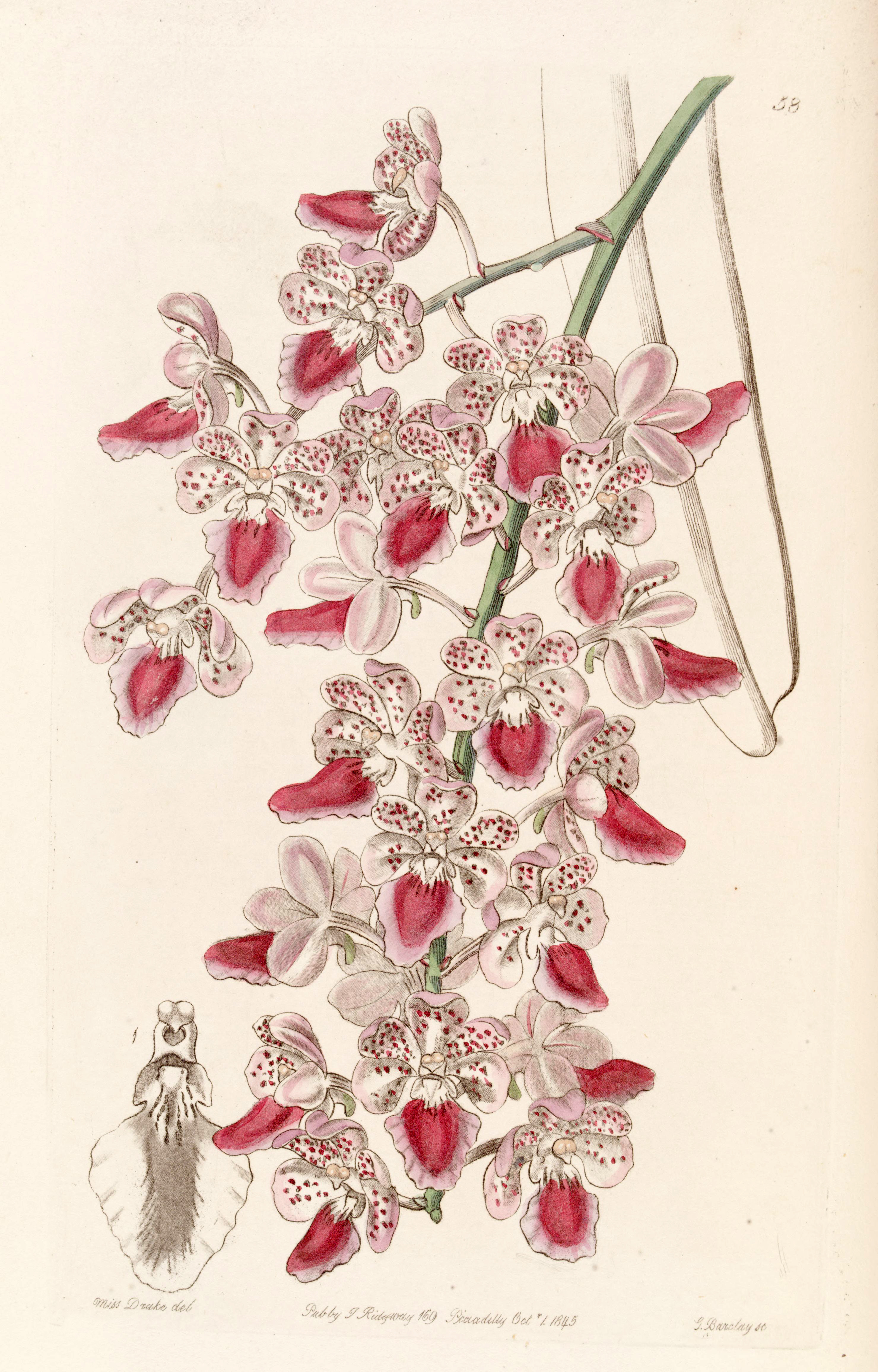 Aerides maculosa (as Aerides maculosum)